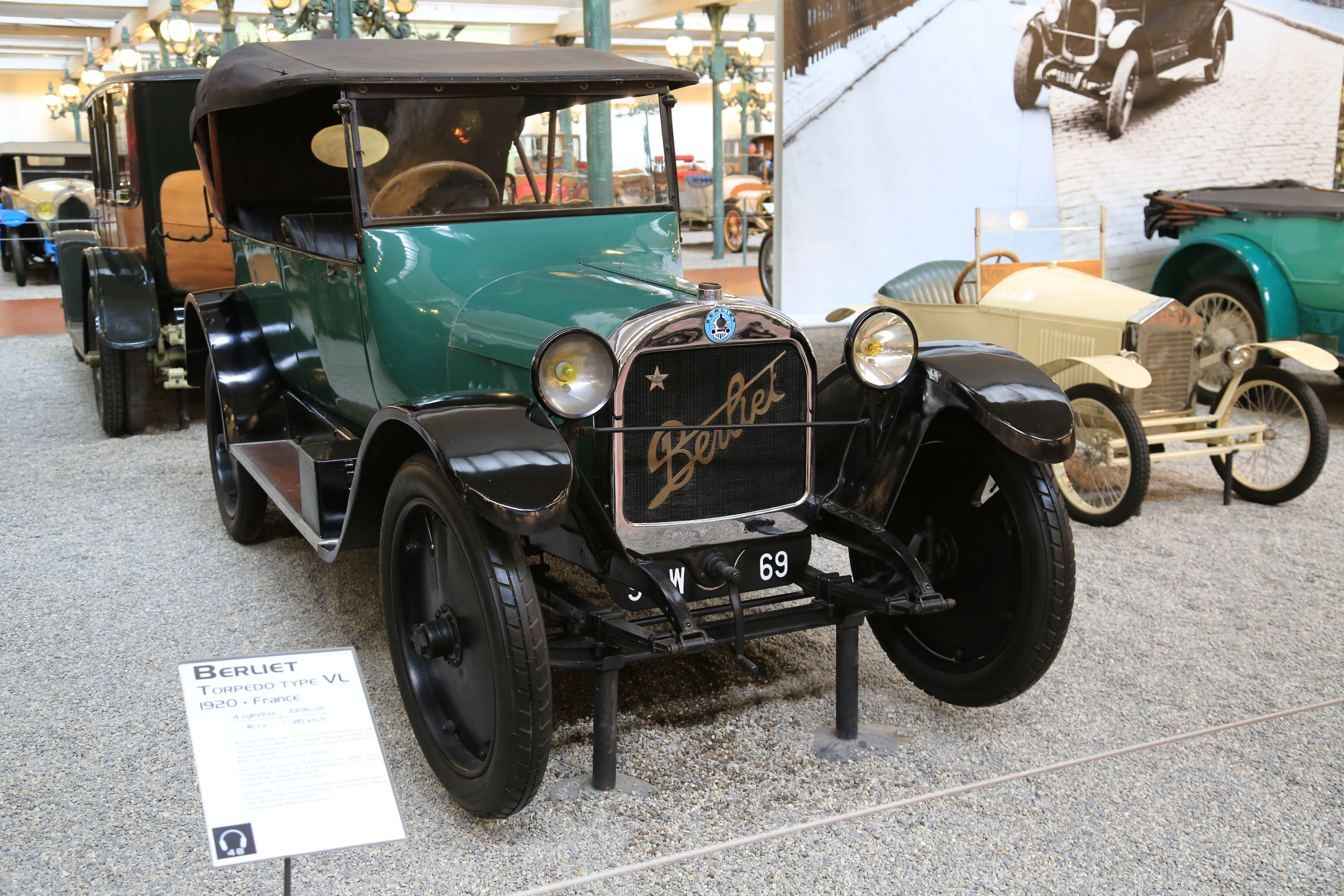 Musée de l'automobile - Mulhouse - Berliet VL 1920 - BH5A5833